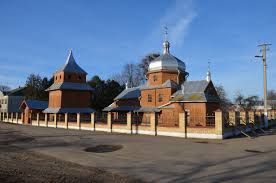 Церква Собору Пресвятої Богородиці ПЦУ (1677р.)